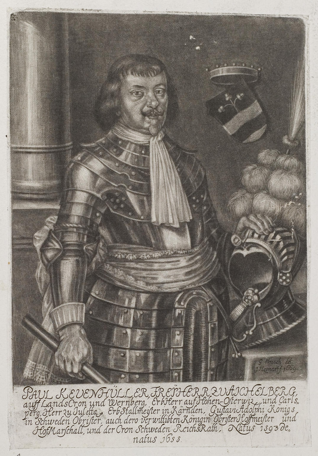 Grafik aus dem Klebeband Nr. 2 der Fürstlich Waldeckschen Hofbibliothek Arolsen Motiv: Paul von Khevenhüller (1593–1655) GND: 136036155 Biographisches Lexikon des Kaiserthums Oesterreich: Khevenhüller, Paul